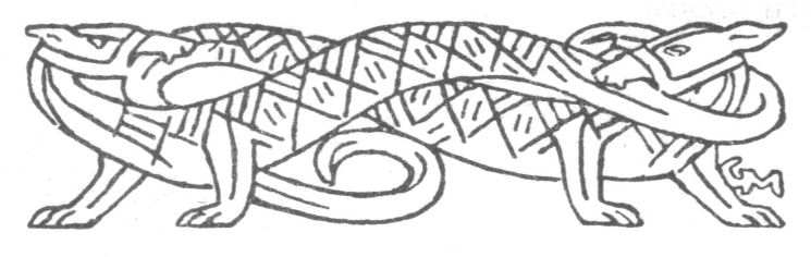 Gerhard Munthe: Illustration for Håkon Herdebreis saga, Heimskringla 1899-edition. Sluttvignett.